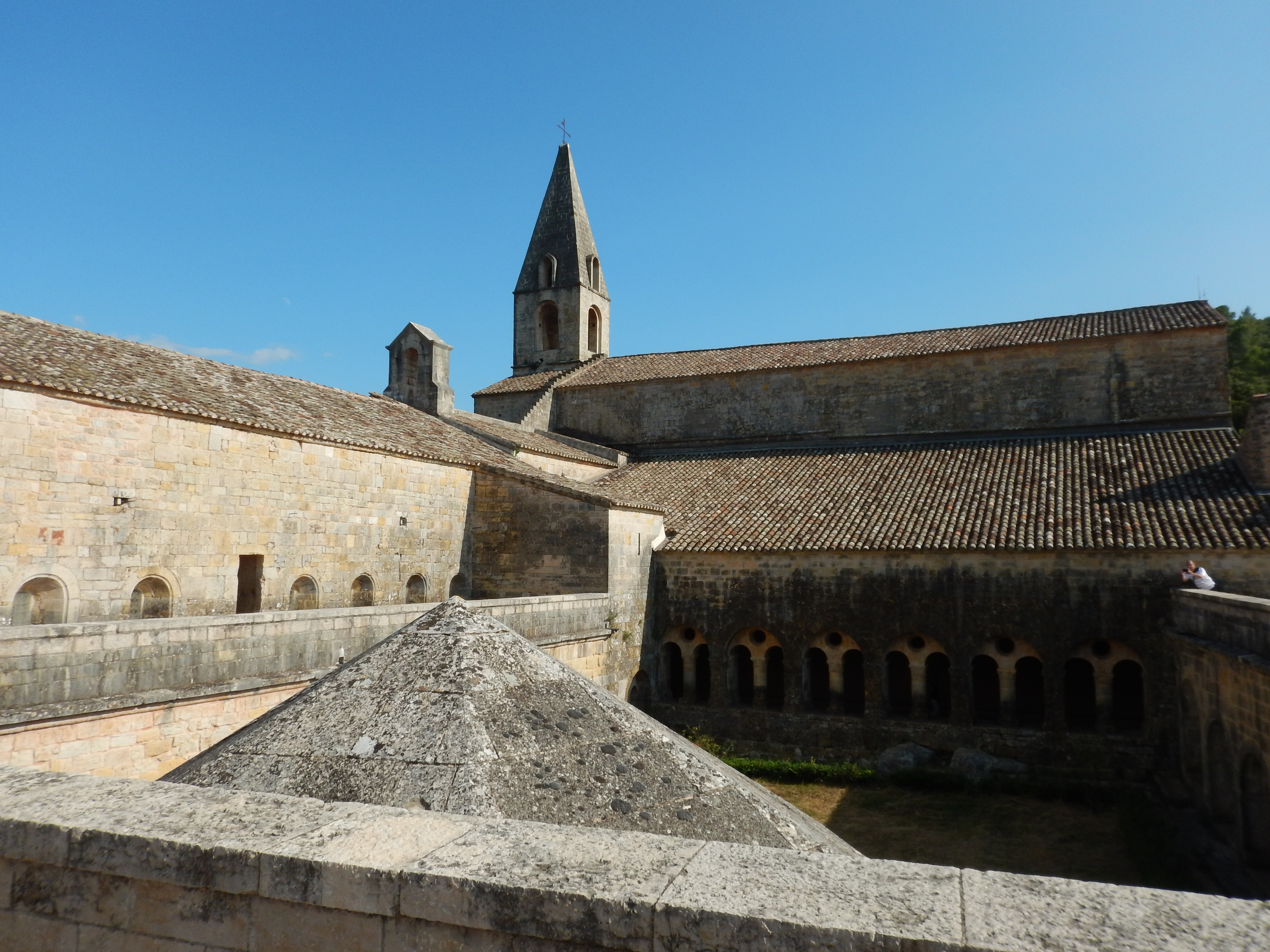 Abbaye du Thoronet